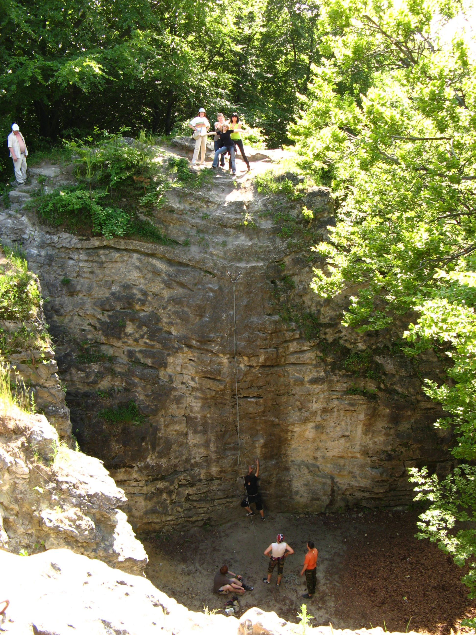 Чотові скелі